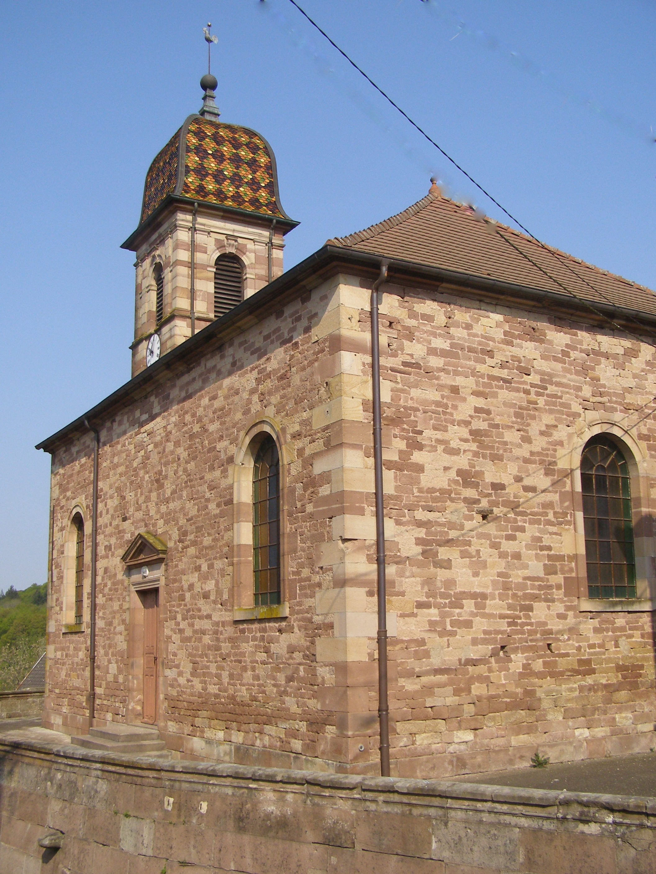 Eglise de Belverne (70) .